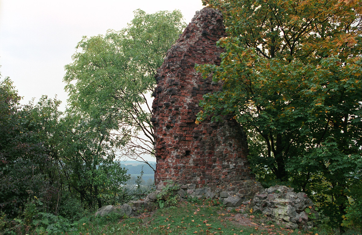 Drawno - ruiny zamku